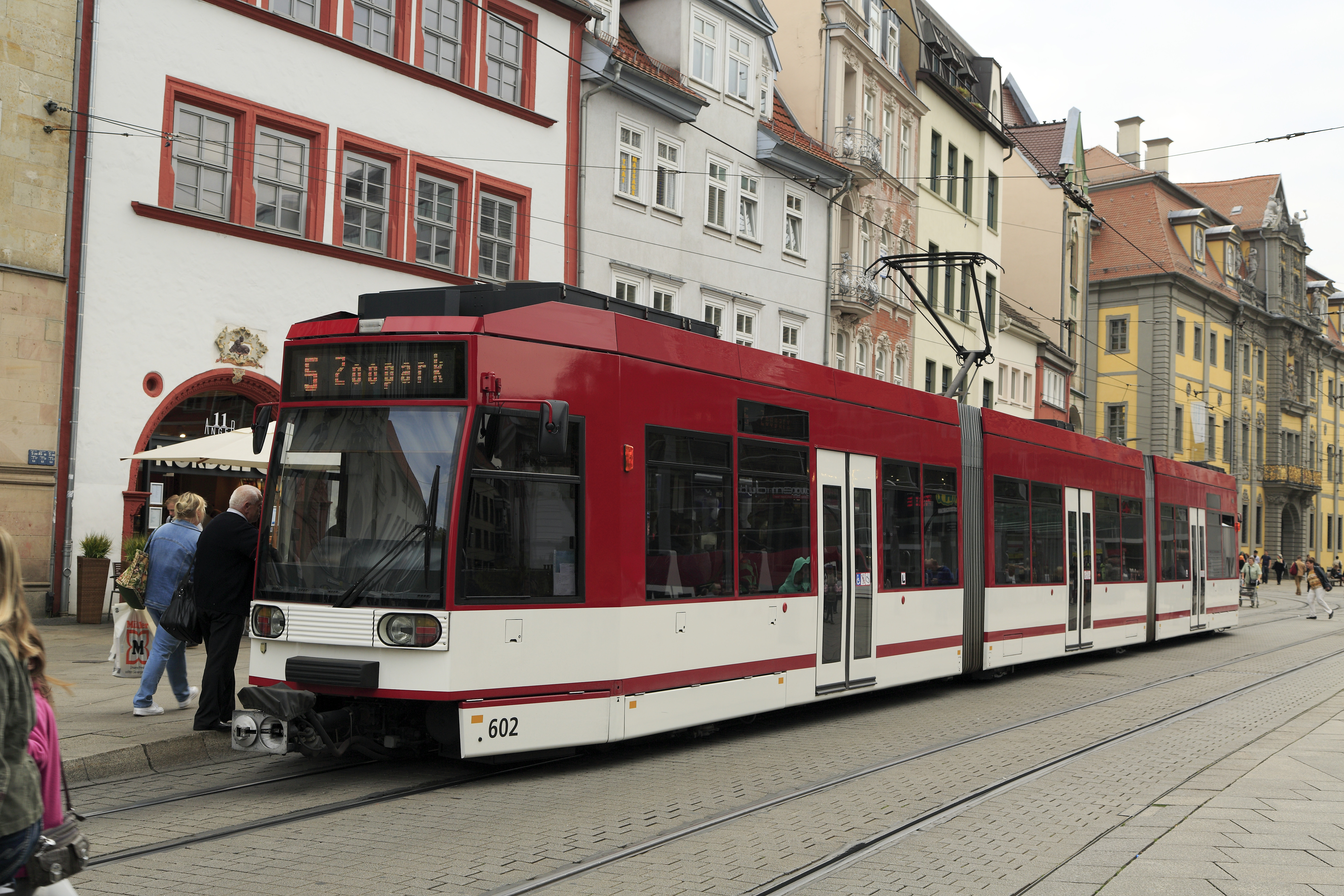 Haltestelle Anger, Gleis 1, Zug der Linie 5 vom Bf Erfurt Hbf zum Zoopark. Die EVAG hat mit den MGT6DZ nur vier echte Zweirichtungswagen.